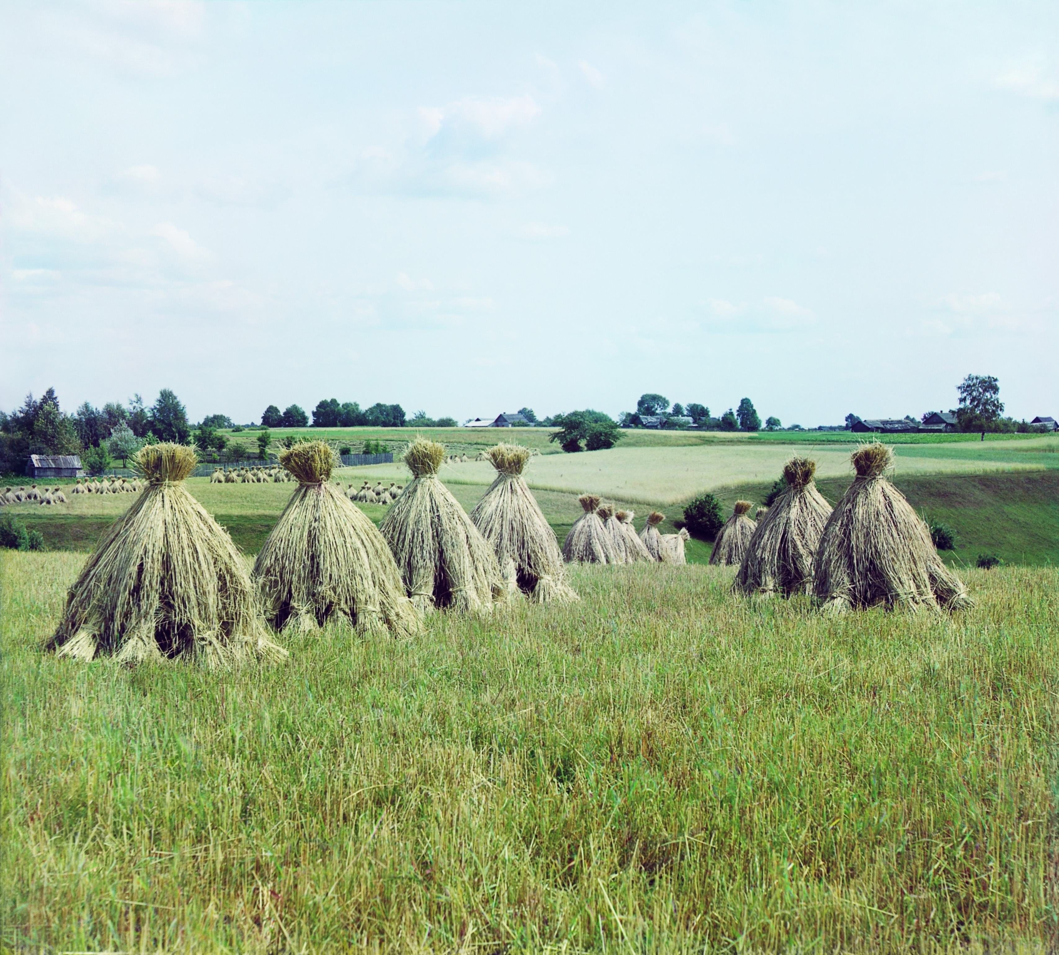 Сжатое поле в Витебской области, 1912 год, С. М. Прокудин-Горский